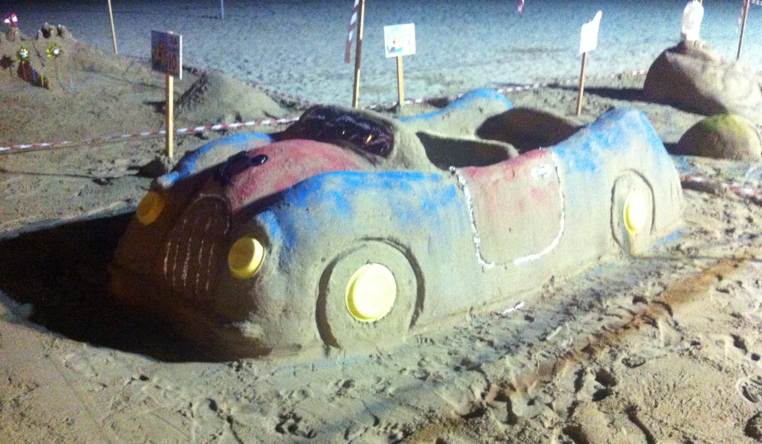 "Gara dei castelli di sabbia" di Tortoreto (2015) - 113 di Topolino